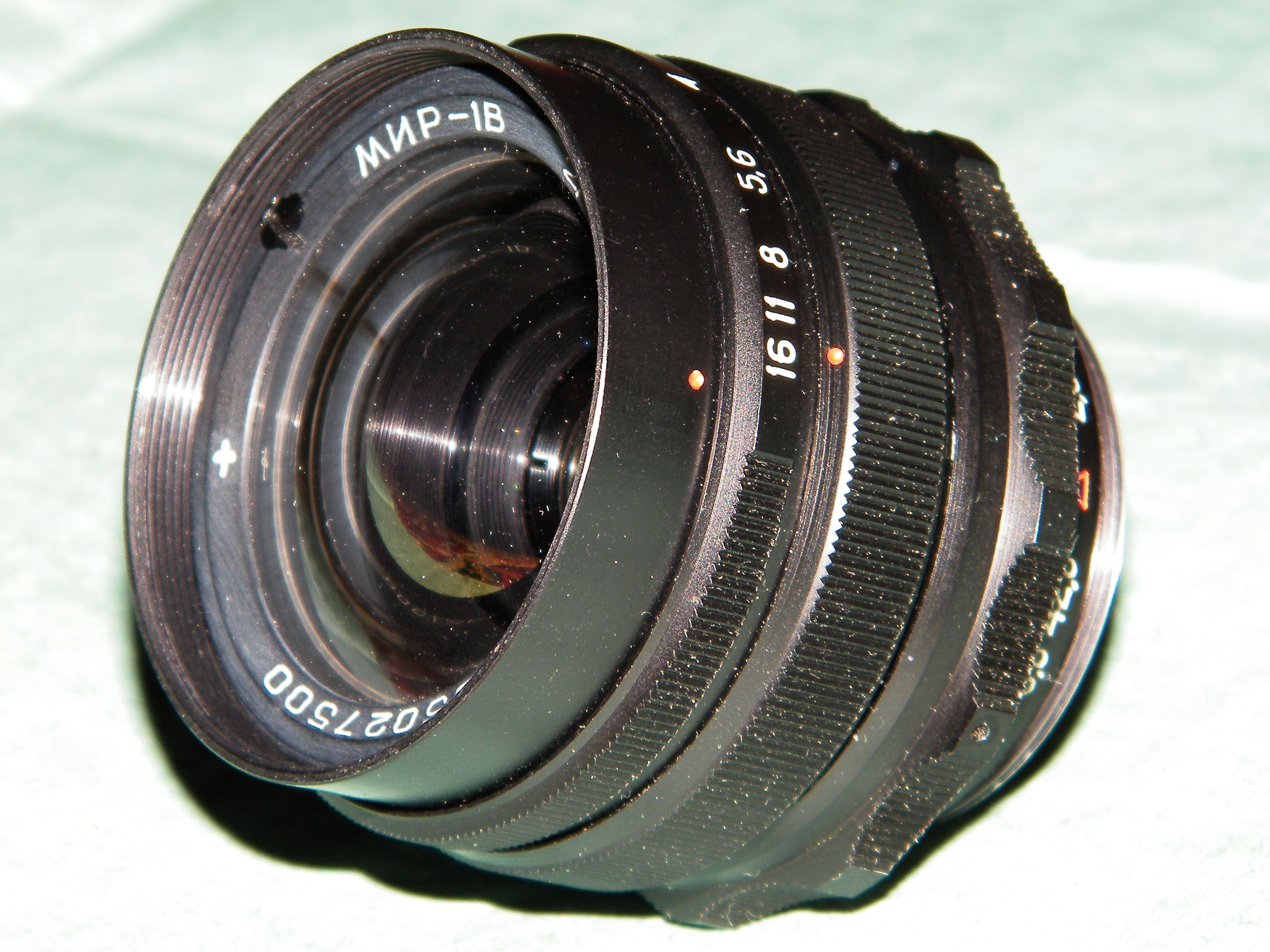 Объектив "Мир-1В" Вологодского оптического завода, 1985 год.